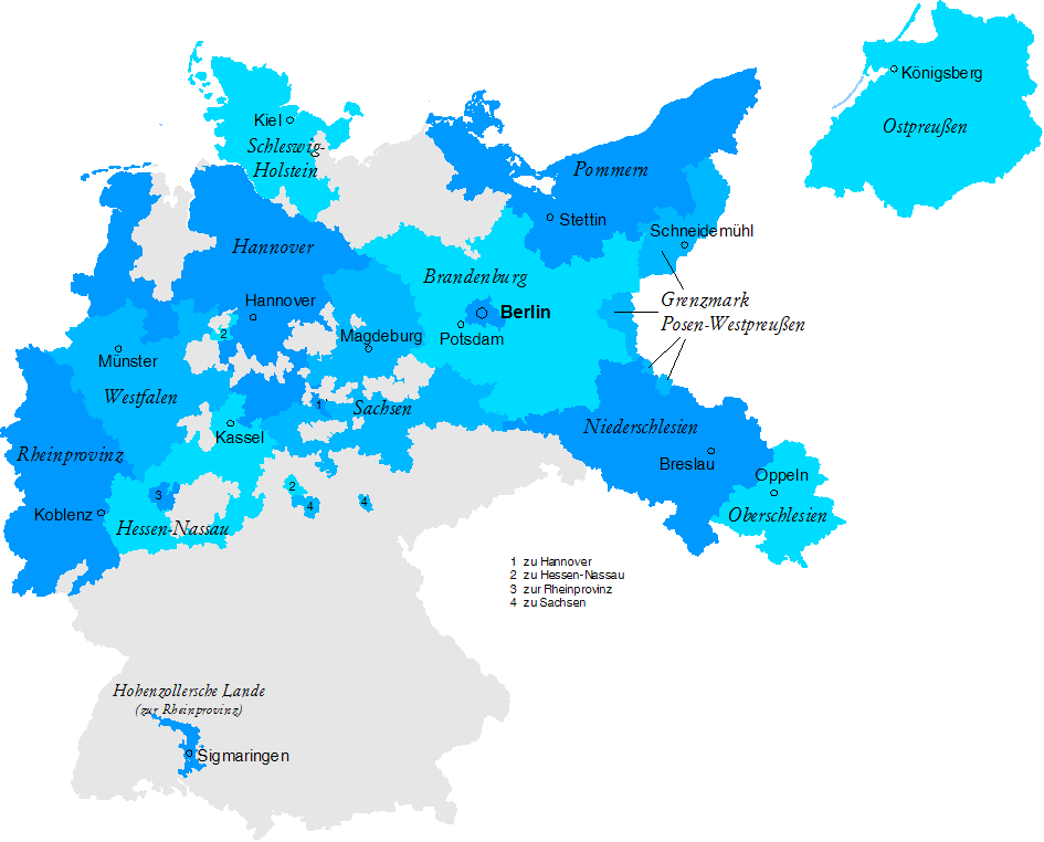 Die preußischen Provinzen und ihre Hauptstädte 1925. In Grau die übrigen Länder des Deutschen Reiches. Kleinere Exklaven sind nicht dargestellt.